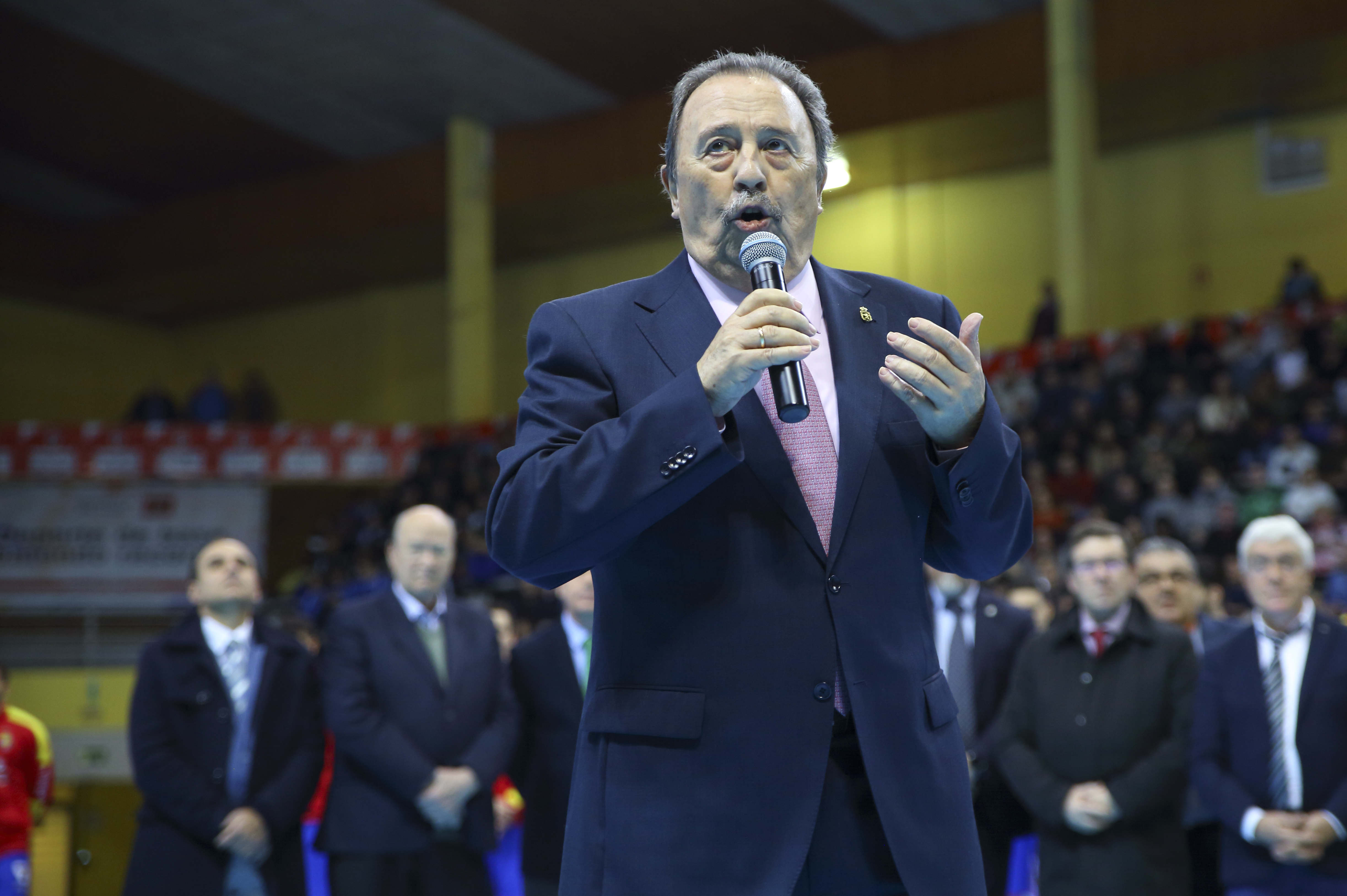 XLIII Torneo Internacional de España, disputado en Pontevedra y Vigo, para el último preparatorio de cara al Europeo, con la convocatorio ya definitiva.